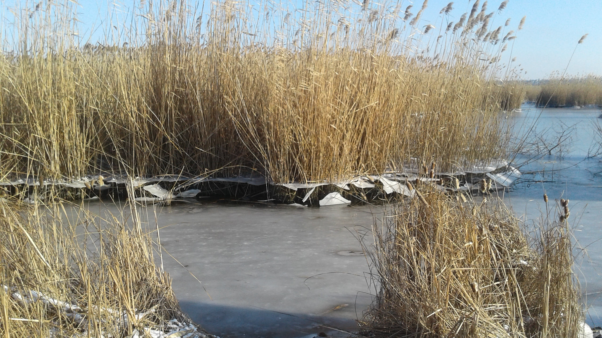 Видно минулий рівень води за залишками попередньої криги, Миколаїв.